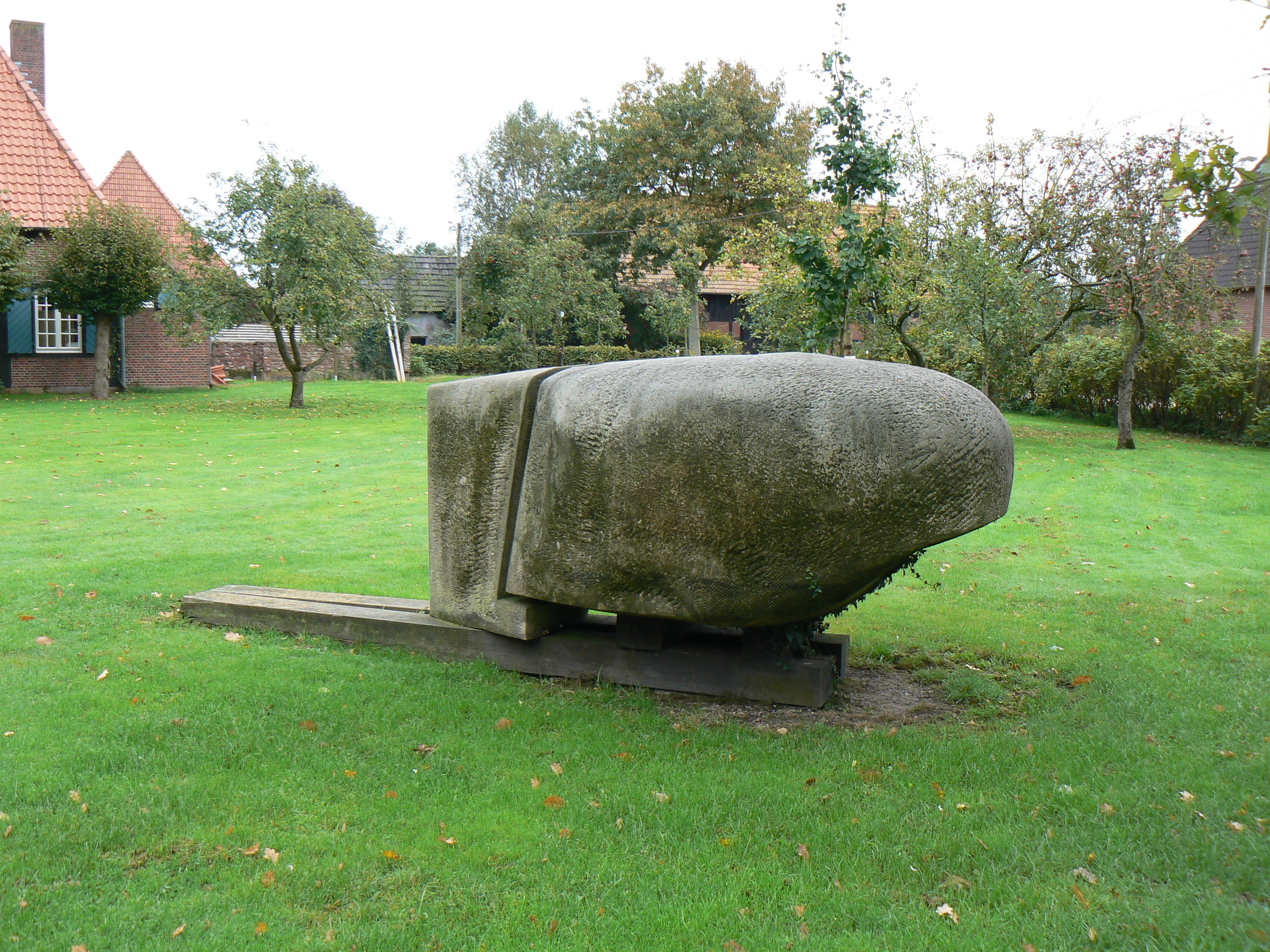 sculpture Frenswegener Kopf 1979 by Louis Niebuhr in Nordhorn/Germany